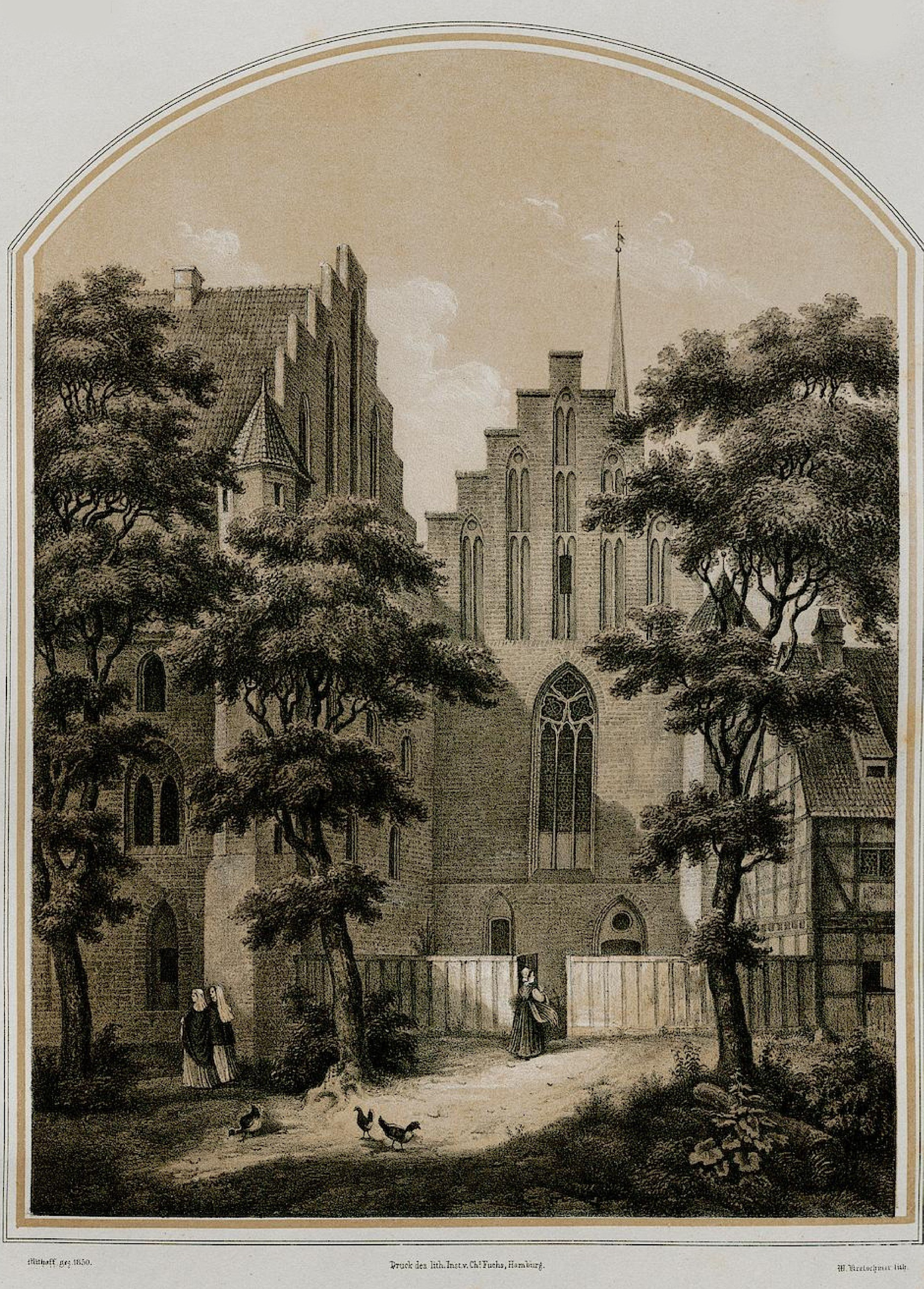 Das Kloster Wienhausen bei Celle. In: Archiv für Niedersachsens Kunstgeschichte : eine Darstellung mittelalterlicher Kunstwerke in Niedersachsen und nächster Umgebung. Hannover: Hellwing, 1849-62. Kloster Wienhausen bei Celle